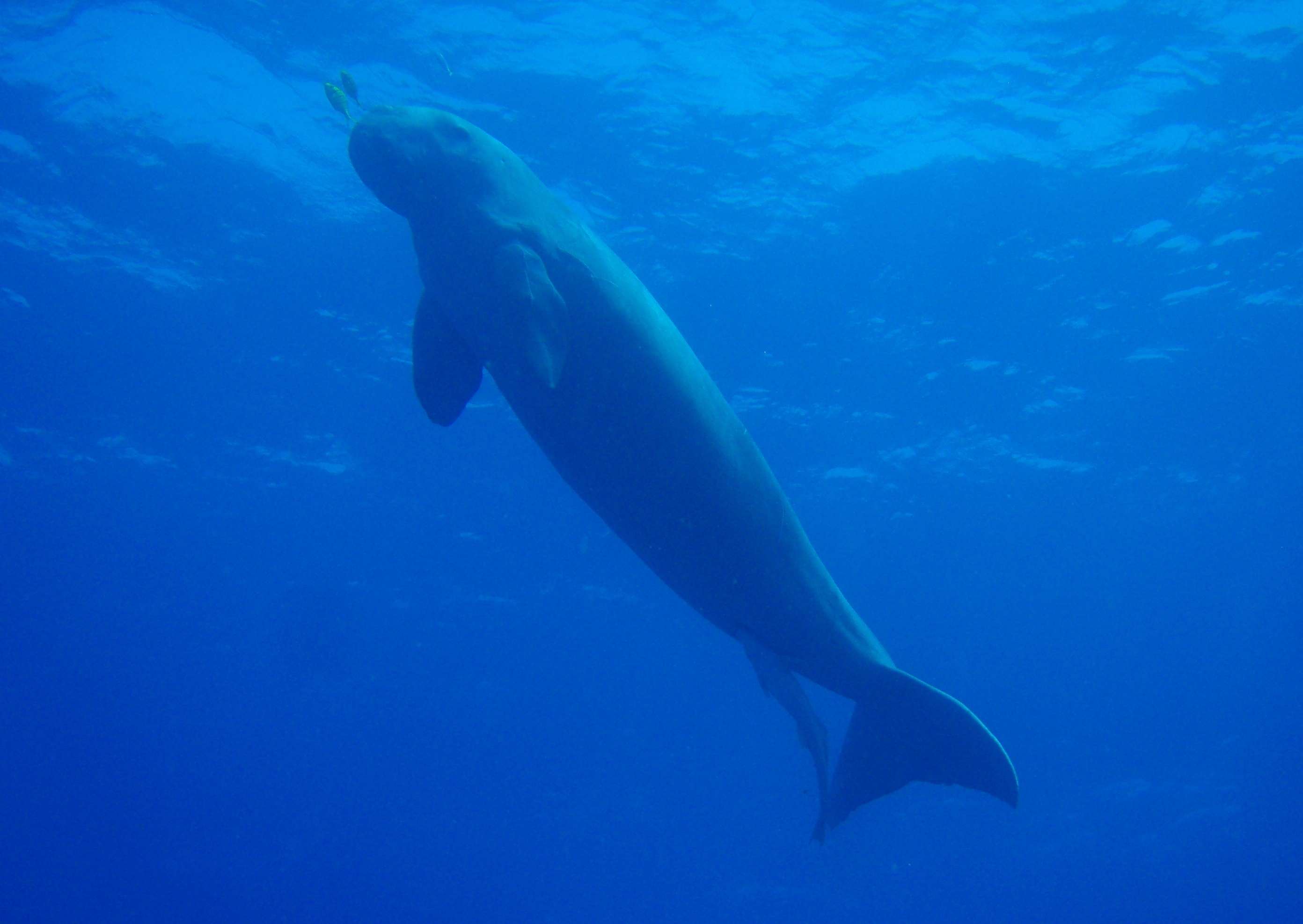 Dugong (Dugong dugon)